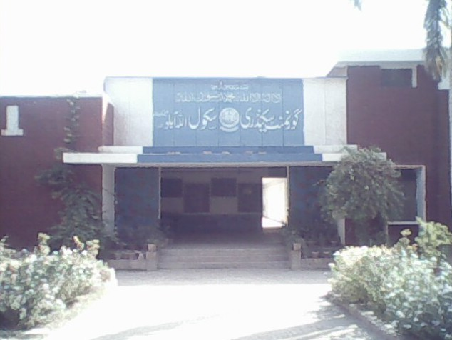 School of Allahabad